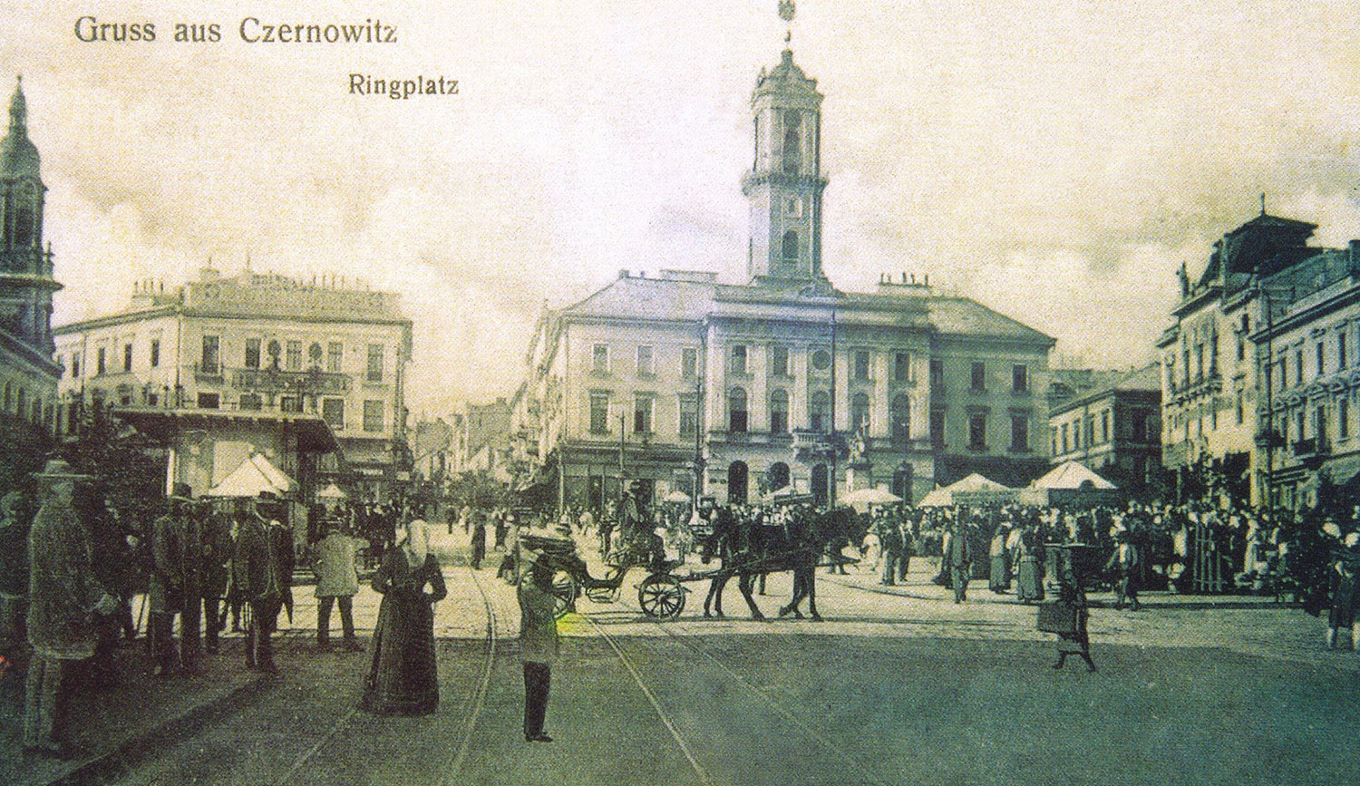 Центральная площадь Черновцов (конец ХІХ начало ХХ в.)